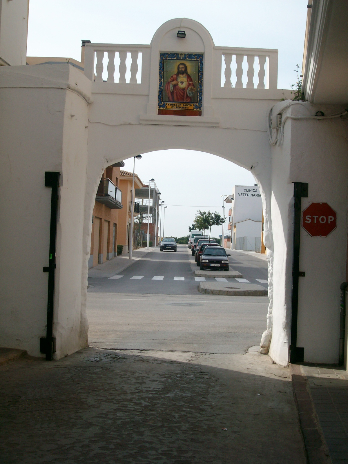 Portal del Cor de Jesus